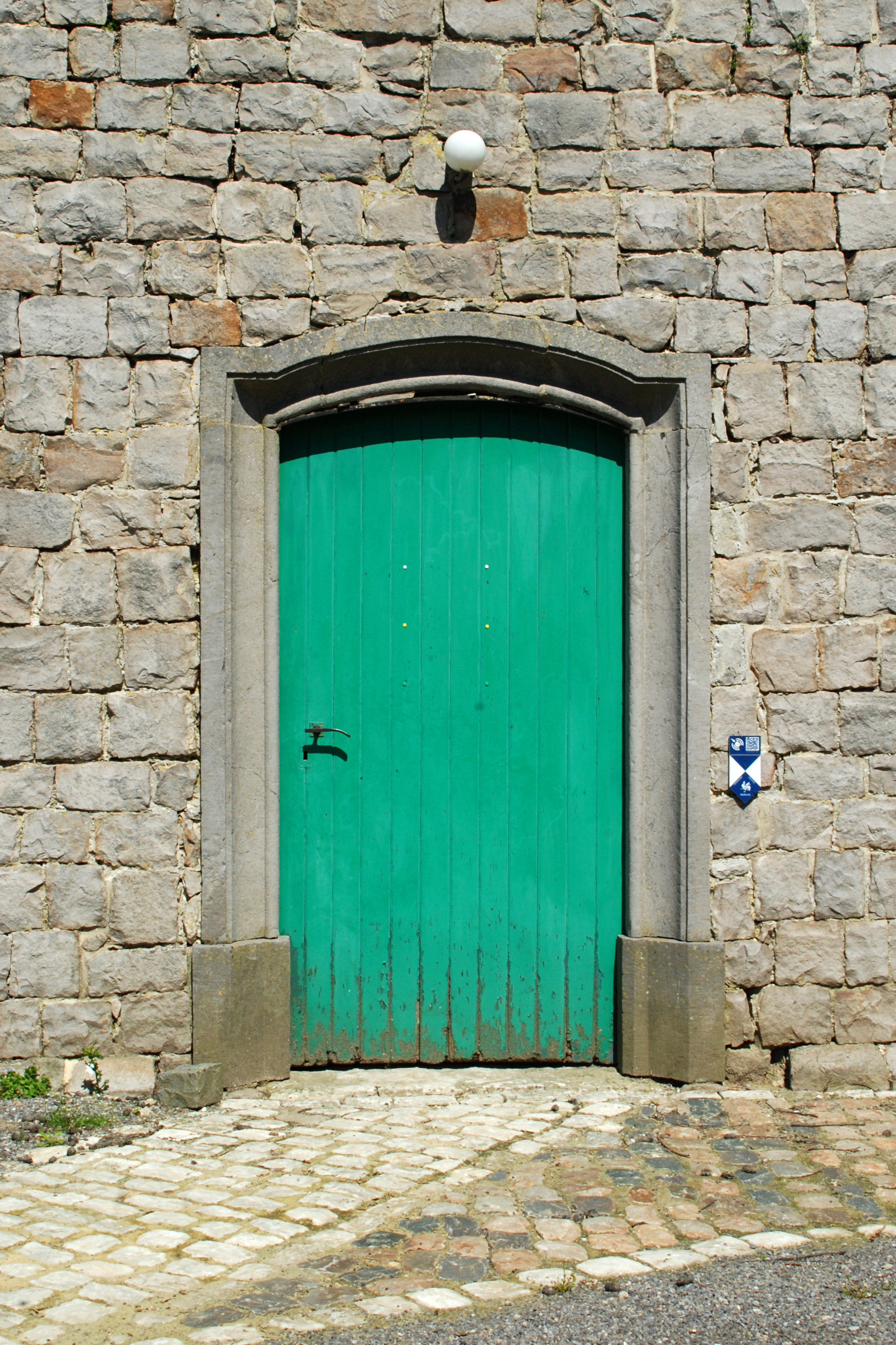 Belgique - Brabant wallon - Jodoigne - Piétrain - Chapelle Sainte-Catherine d'Herbais